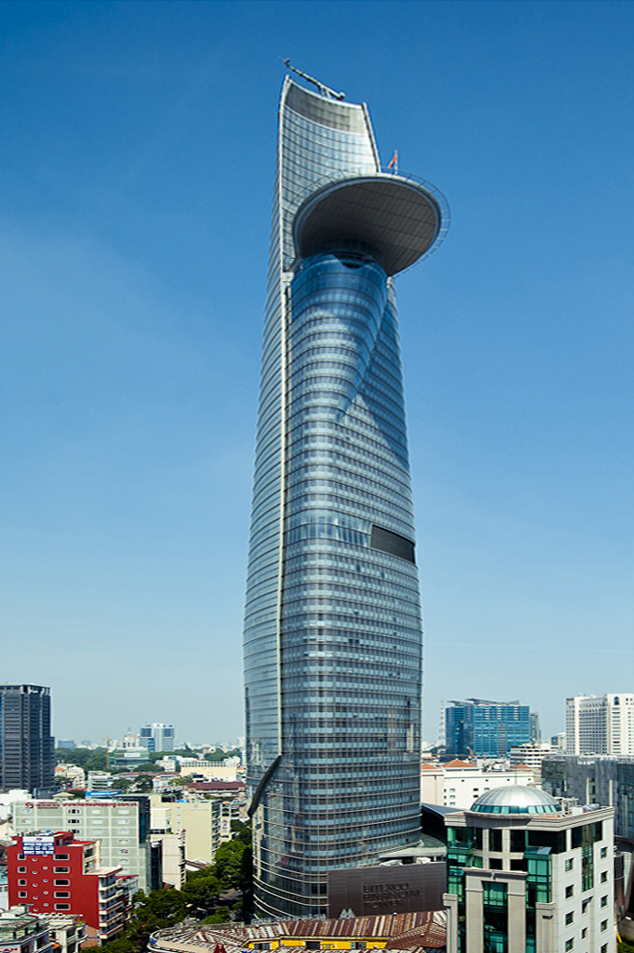 Tháp Tài chính Bitexco